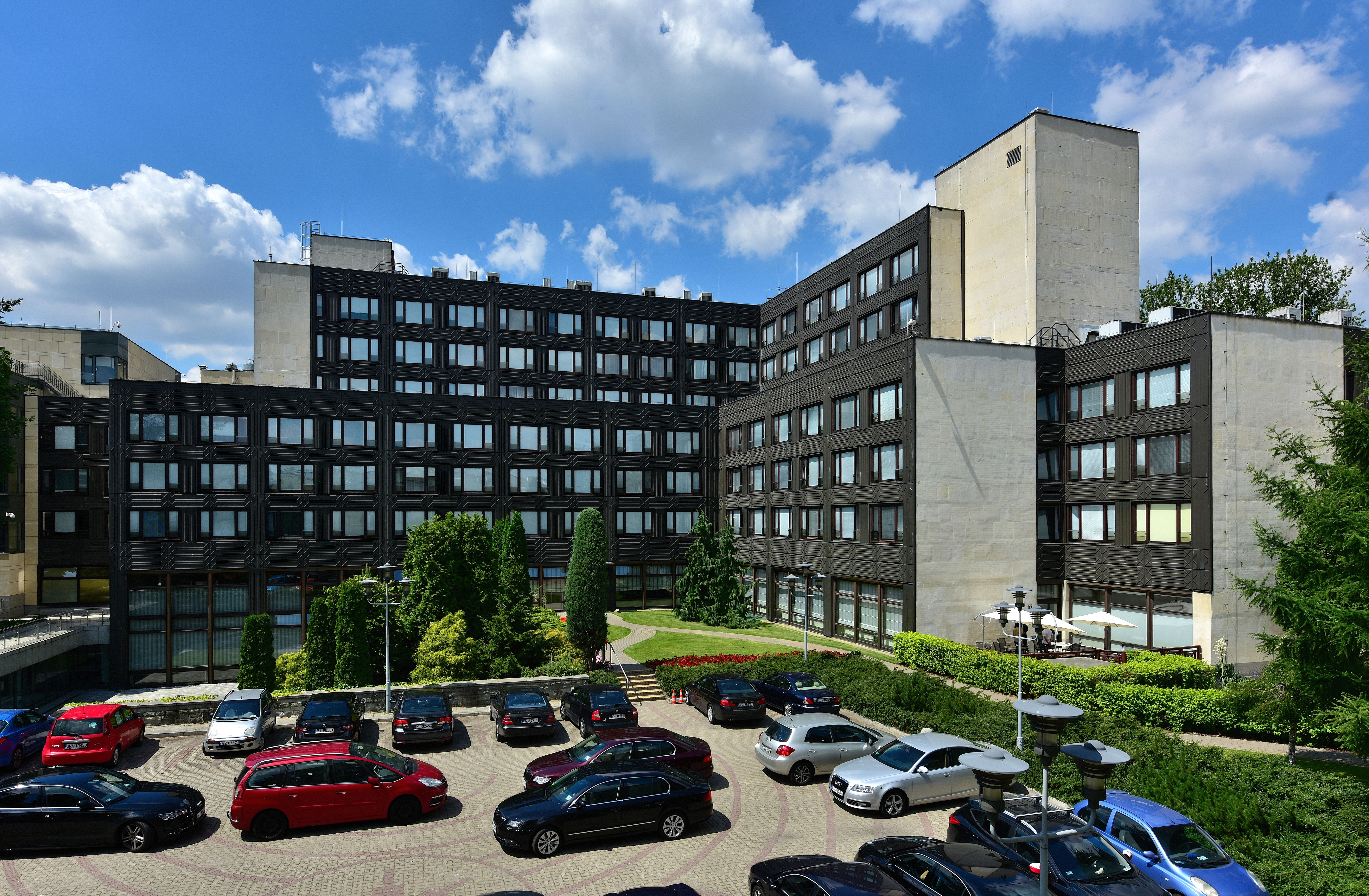 Nowy Dom Poselski w Warszawie